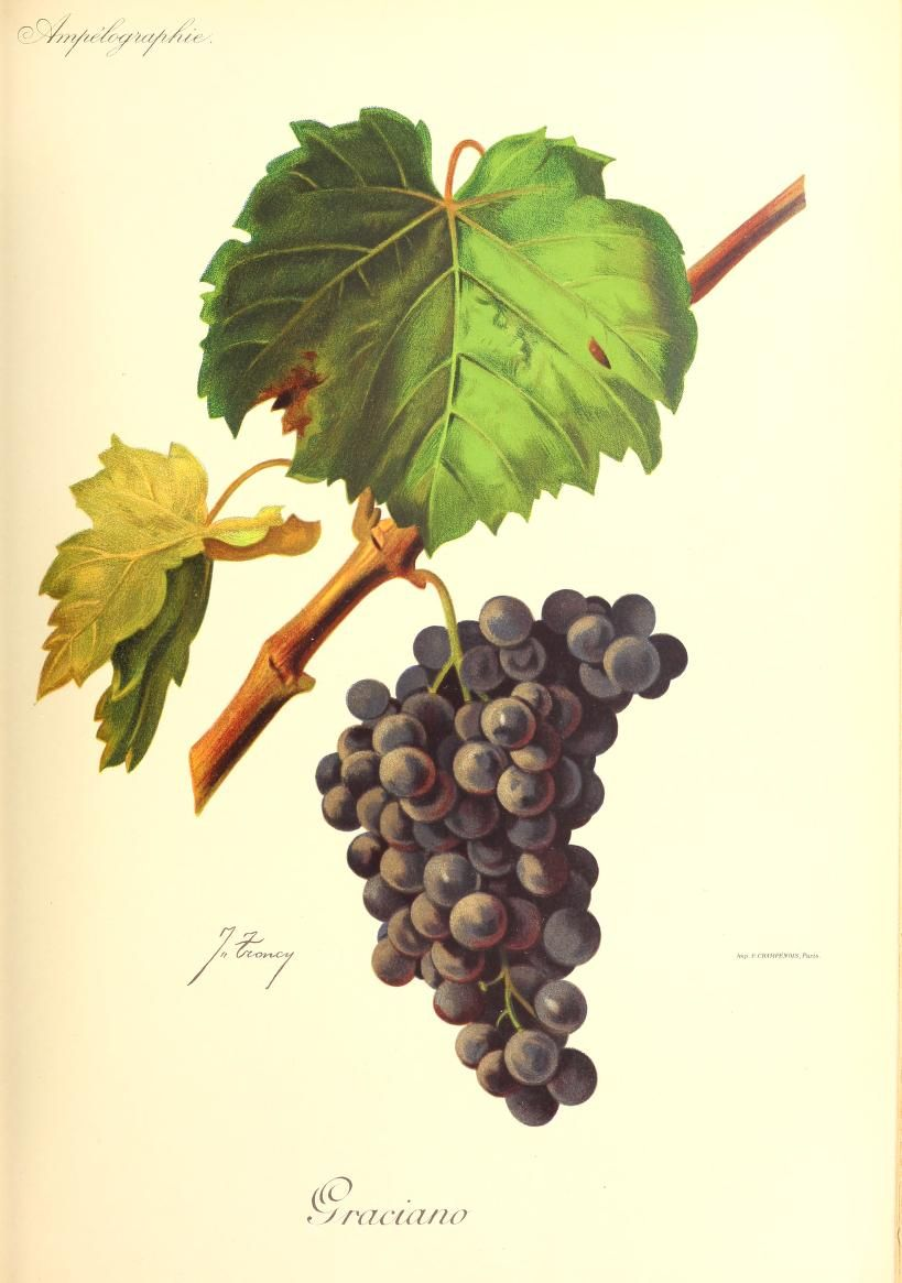 Illustration du cépage Graciano par Jules Troncy dans l'ouvrage "Ampélographie : traité général de viticulture" publié sous la direction de P. Viala & V. Vermorel avec la collaboration de A. Bacon, A. Barbier, A. Berget [et al.] - Date de l'édition originale : 1901-1910